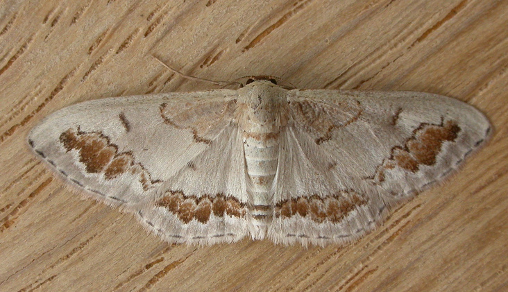 Dithalama cosmospila